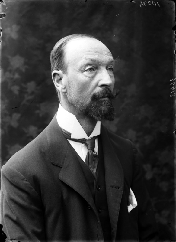 Clemente Origo fotografato da Mario Nunes Vais